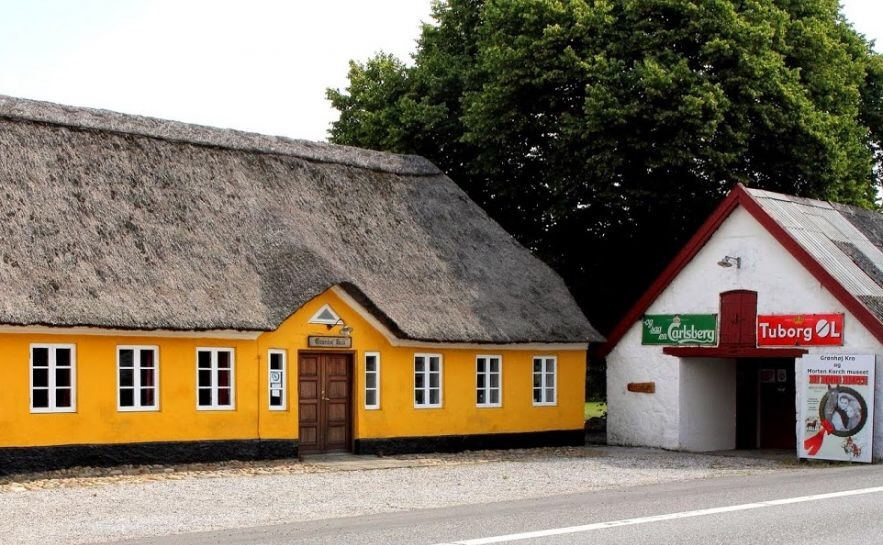 Grønhøj Kro og Morten Korch museum.